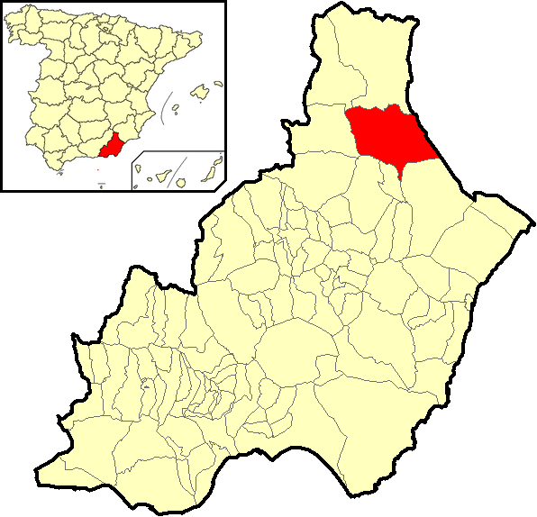 Situación del término municipal de Vélez-Rubio respecto a la provincia de Almería, en España.